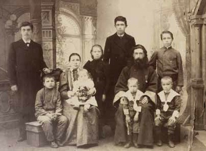 Священник Стефан Богоявленский с семьей. фото начала XX века. Крайний справа - Константин Меркушинский